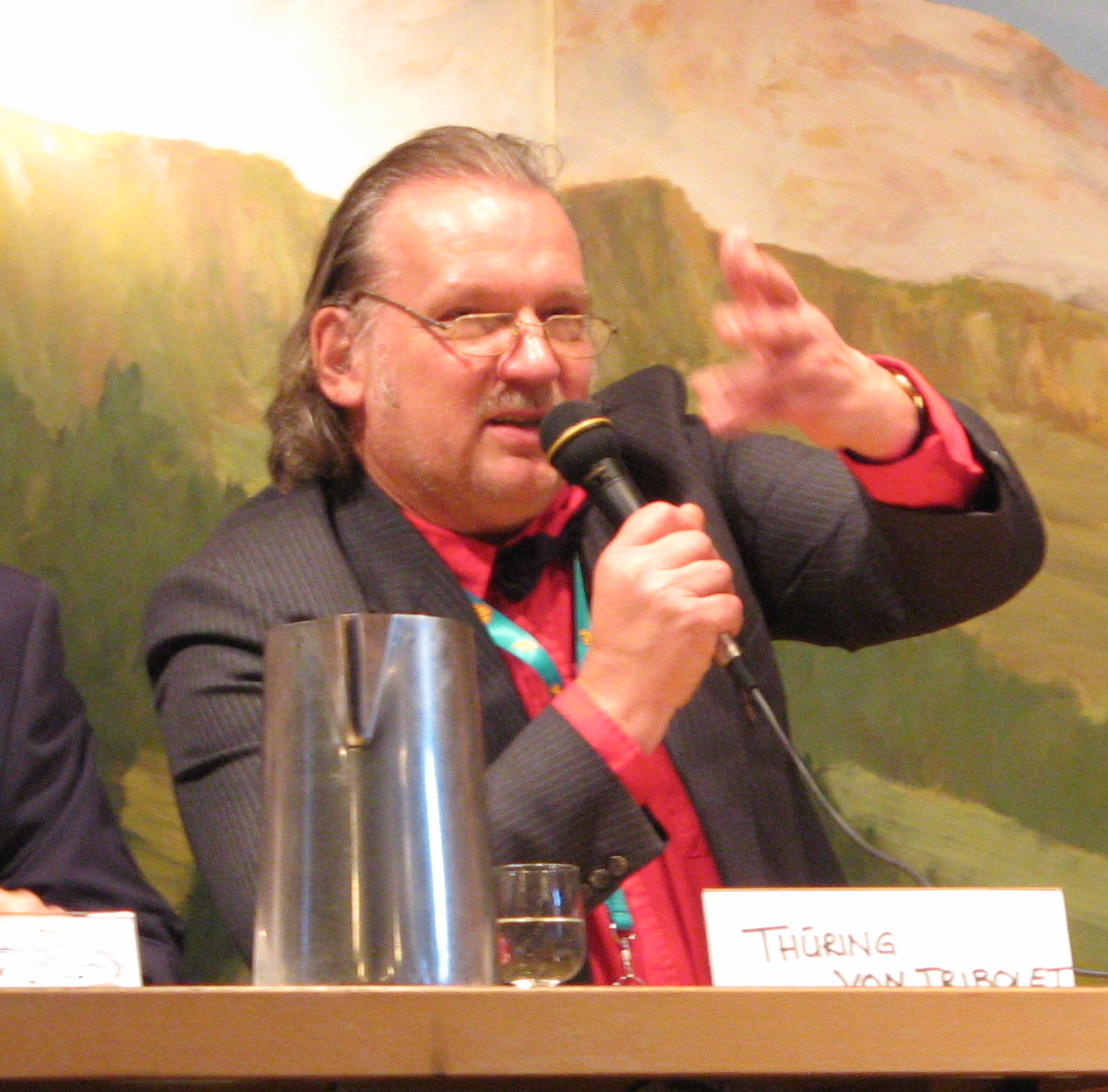 Urs Hostettler als "Thüring von Tribolet" in "Aufschwung Emmental"